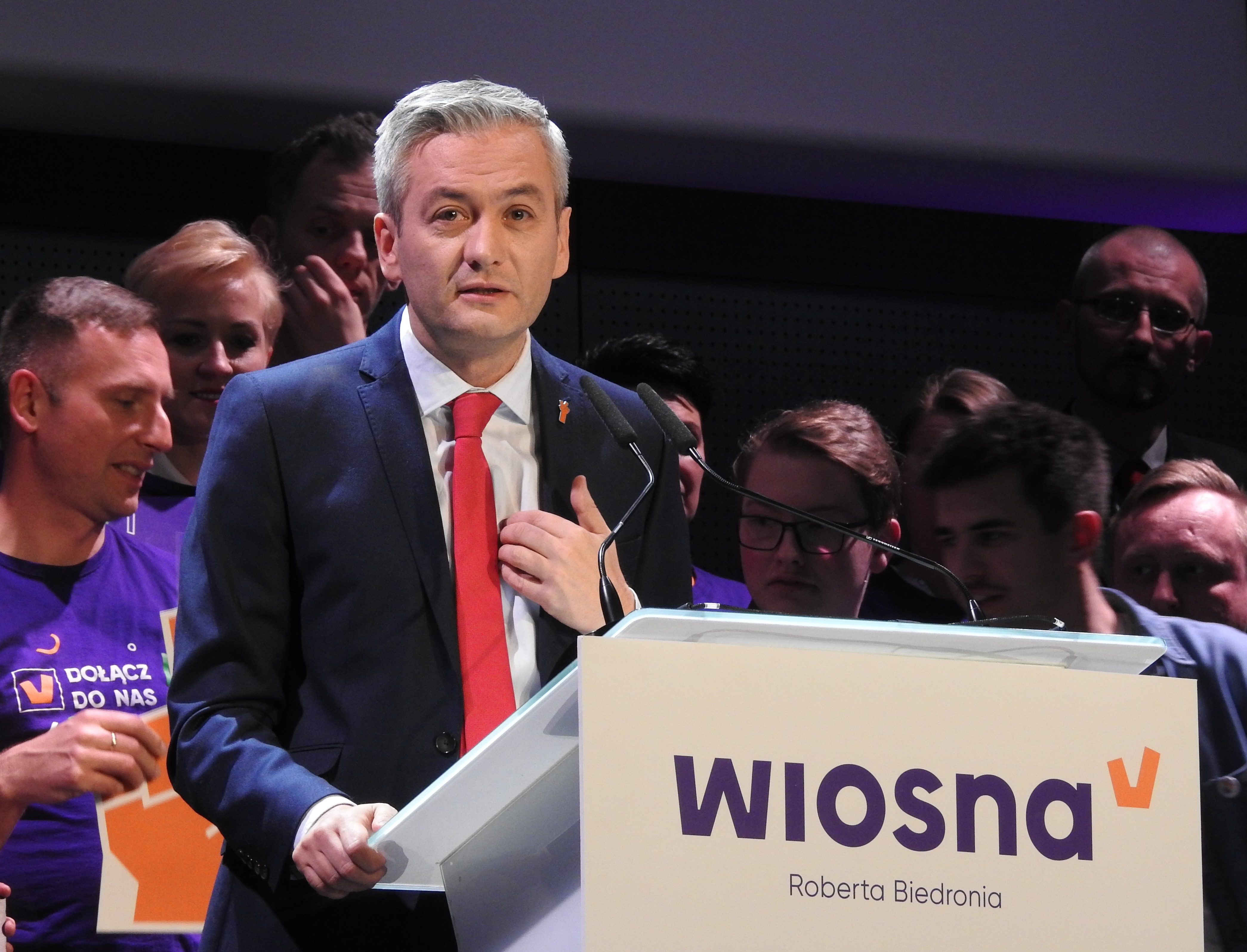 Robert Biedroń - konwencja wyborcza partii Wiosna, Kielce, Targi Kielce, 19.02.2019 r.